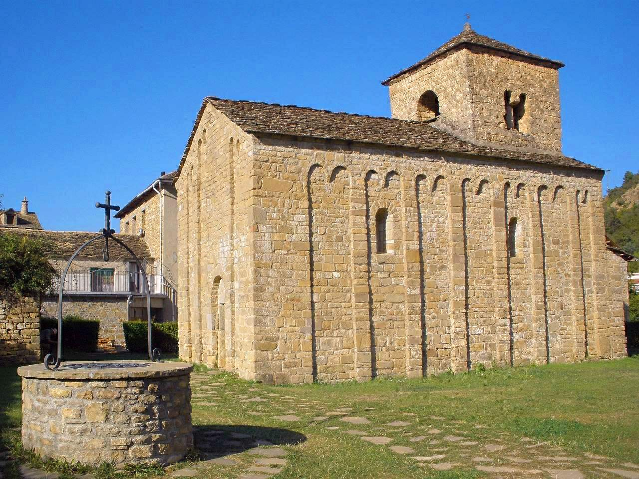 Iglesia de San Caprasio, en Santa Cruz de la Serós (Huesca)